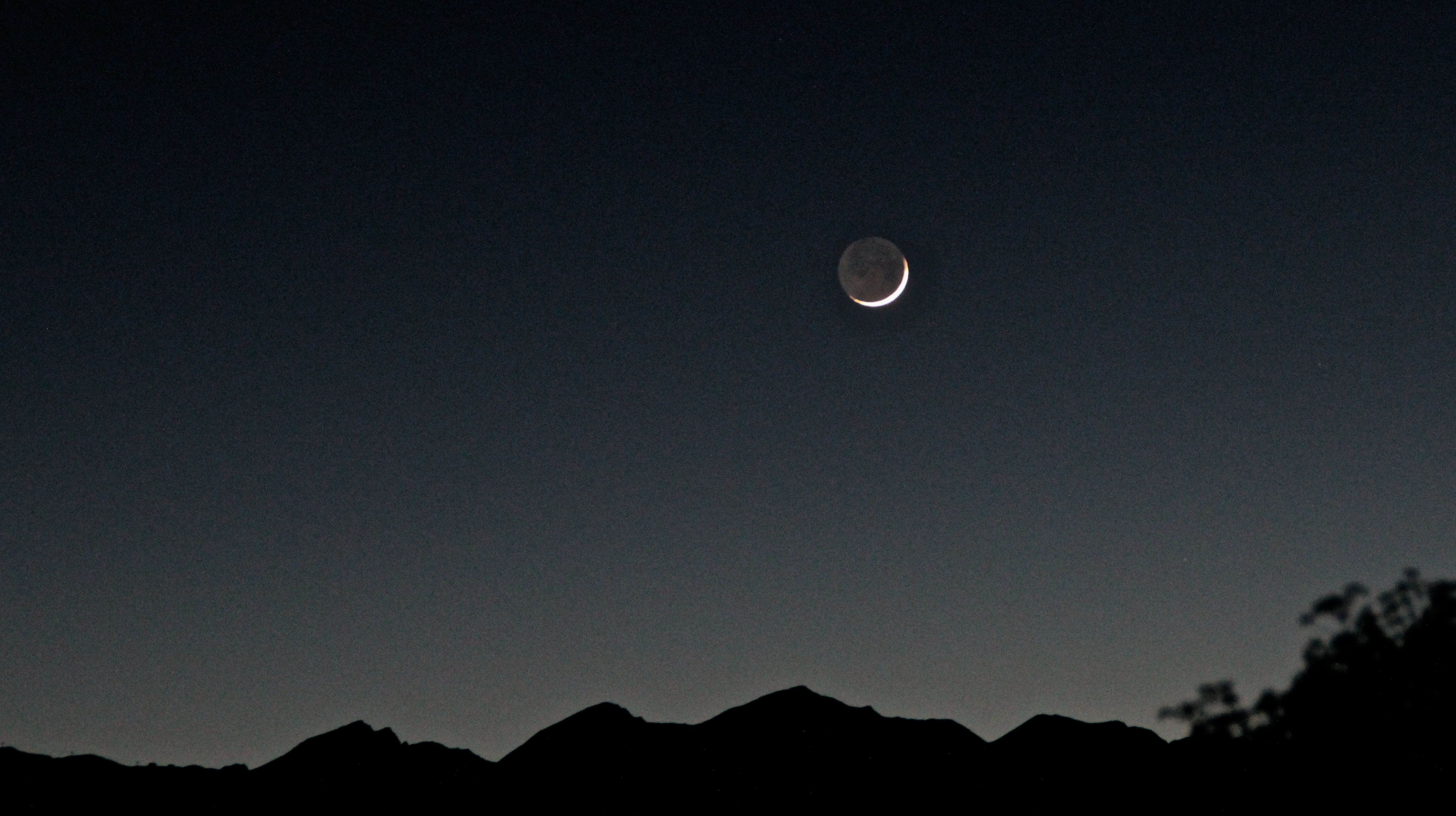 Zunehmender Mond am 23. Dezember 2014